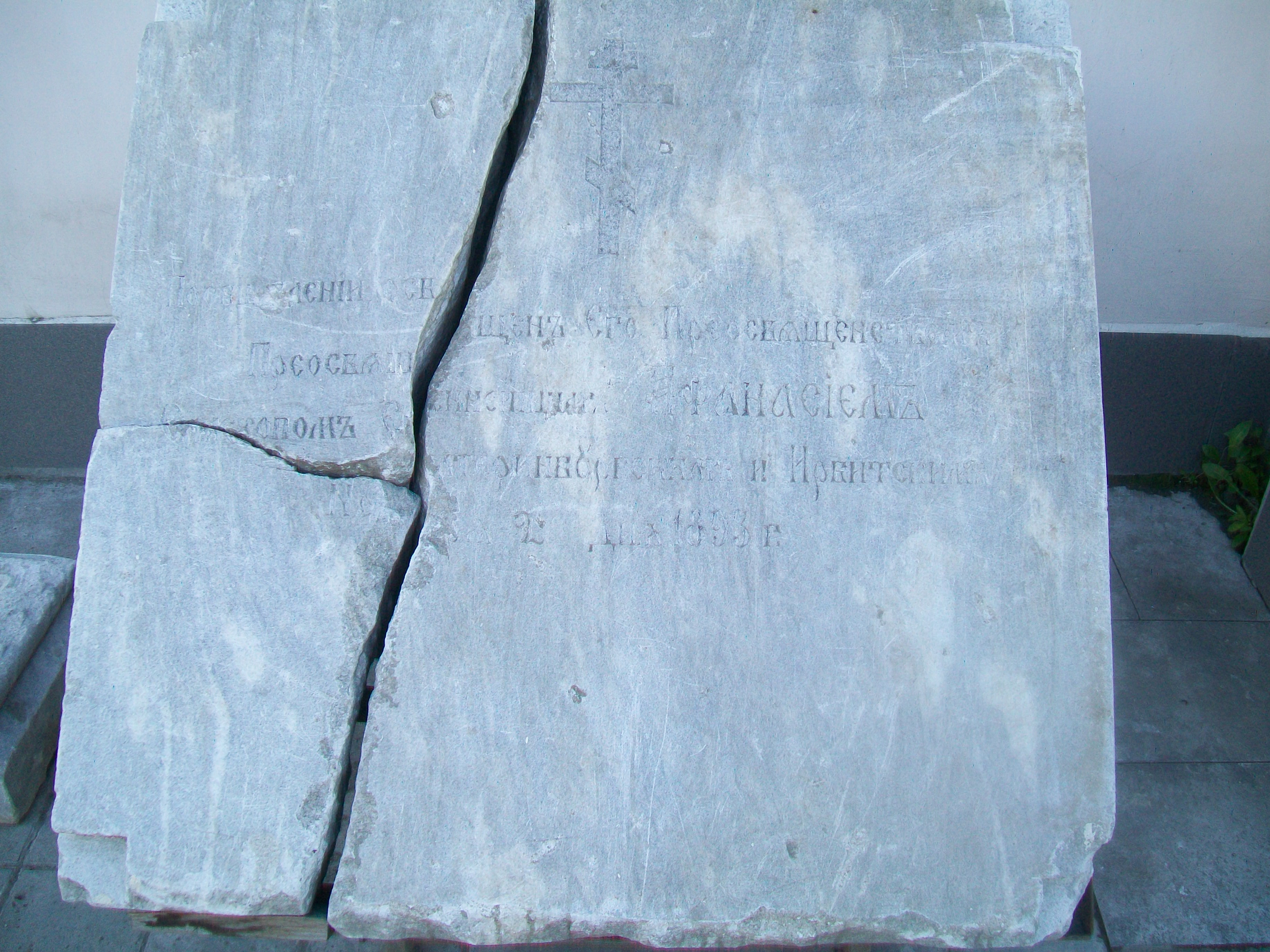 Закладной камень Богоявленского кафедрального собора Екатеринбурга (храм не сохранился). Найден при раскопках. Установлен у Храма во имя Святителя Иннокентия Московского (Екатеринбург). Фото сделано в мае 2017 года